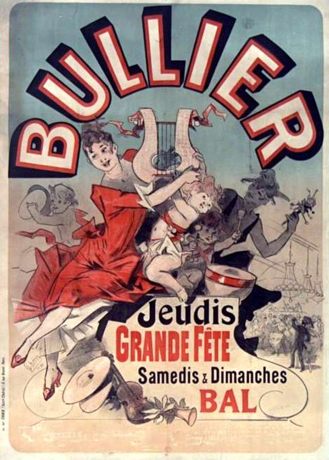 Affiche pour le Bal Bullier. Lithographie en couleurs ; 122 x 87 cm